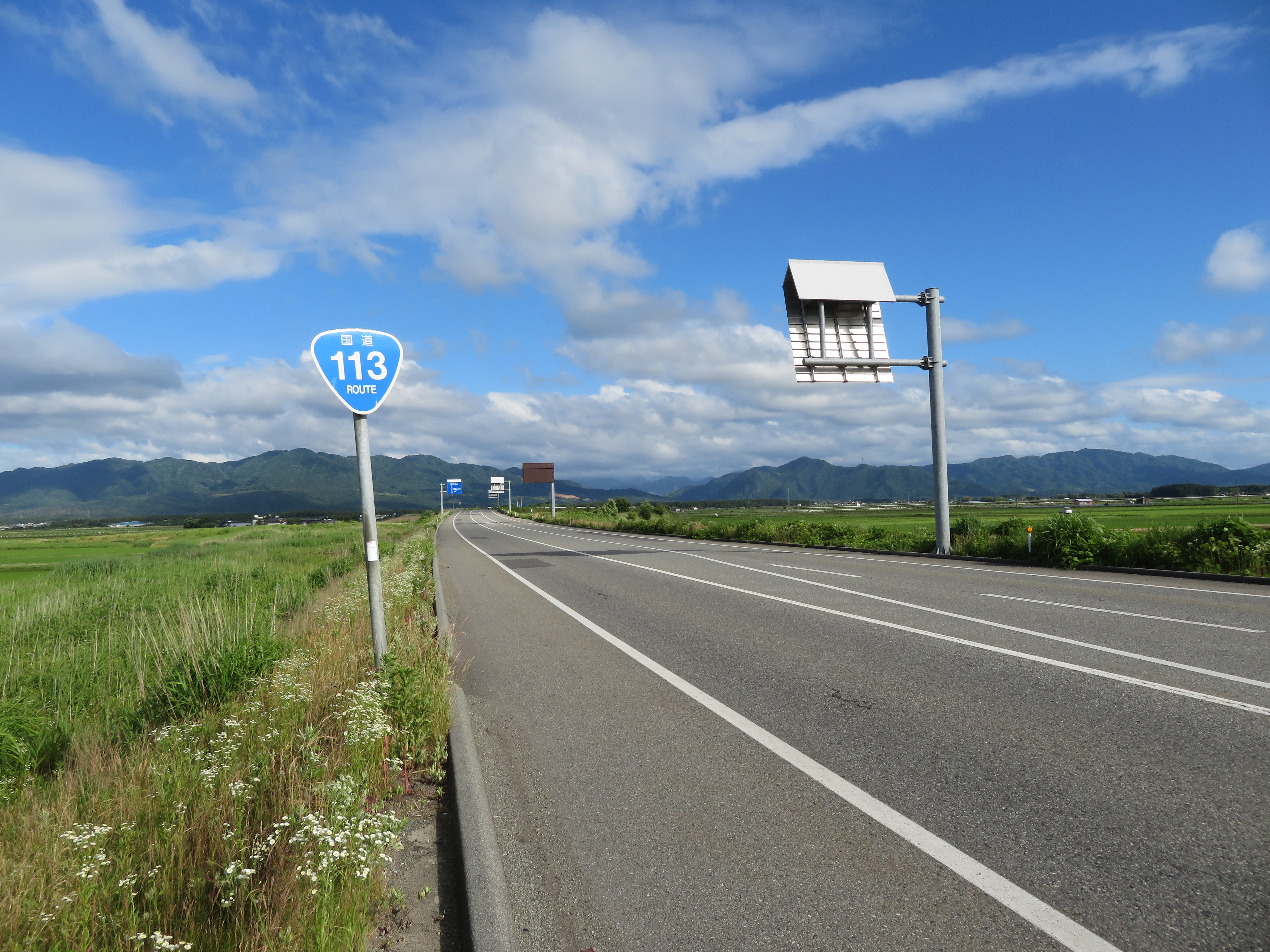 国道113号線荒川道路 新潟県村上市南新保付近（国道7号線方面を撮影） Canon PowerShot SX720 HS